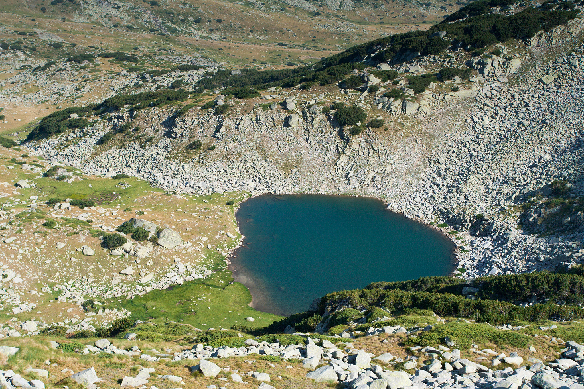 Пирин, Пирин, най-високото от Башлийските езера